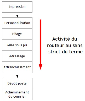 Explication de la chaîne de routage